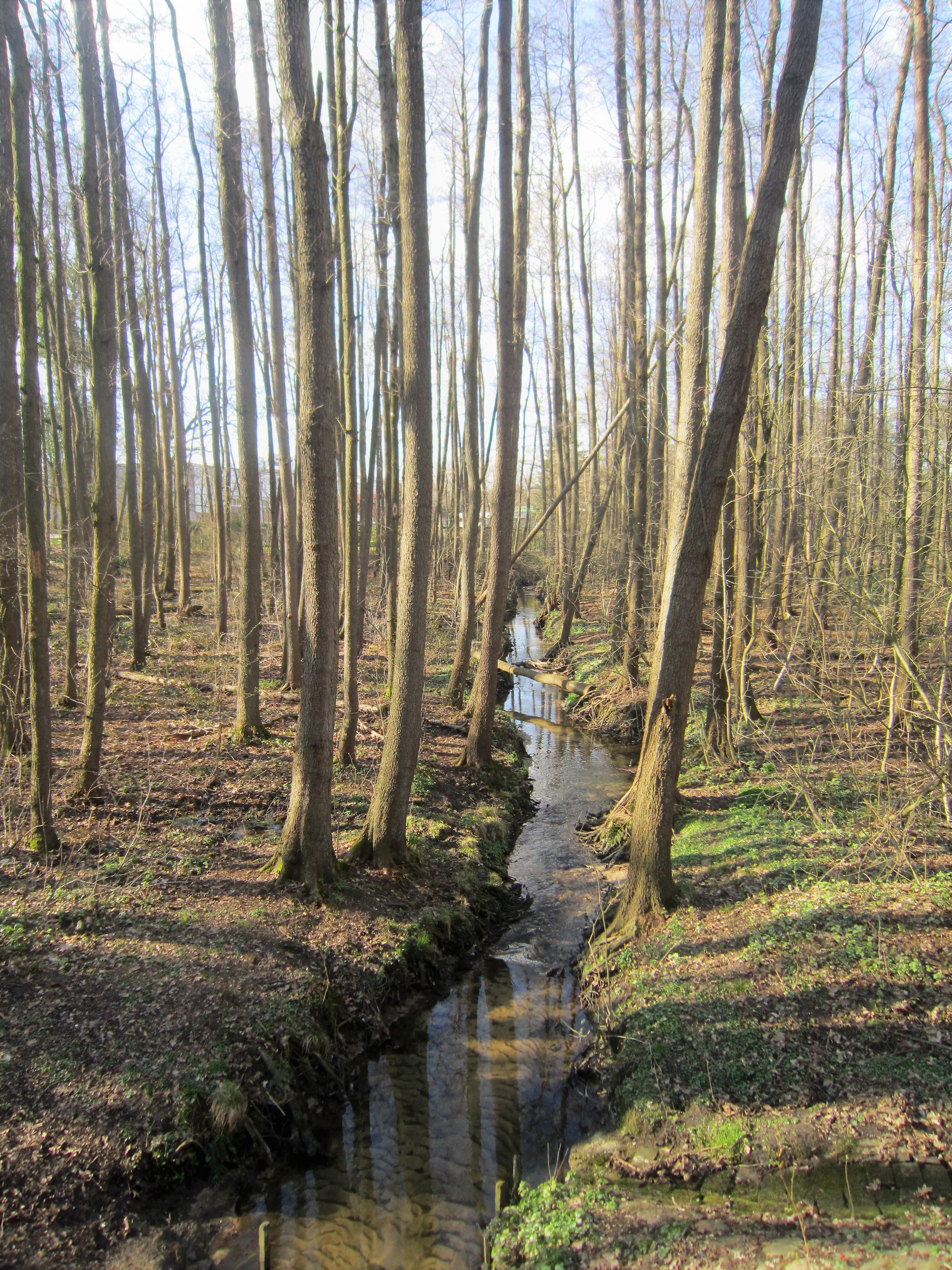 Urstromtal des Visbeker Bruchbachs unterhalb des Visbeker Ortskerns neben dem Kreuzweg